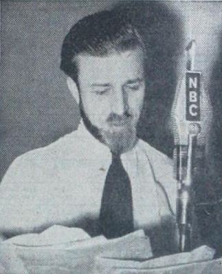 Robert St. John